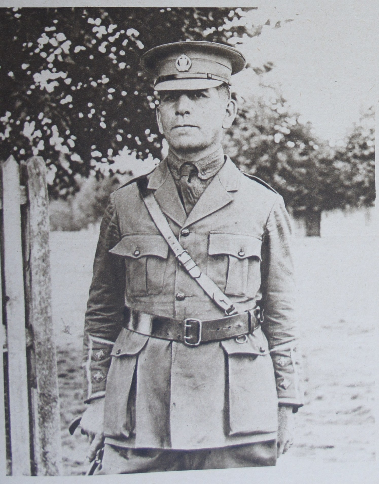 publié dans le magazine le Miroir n° 196 page 15.